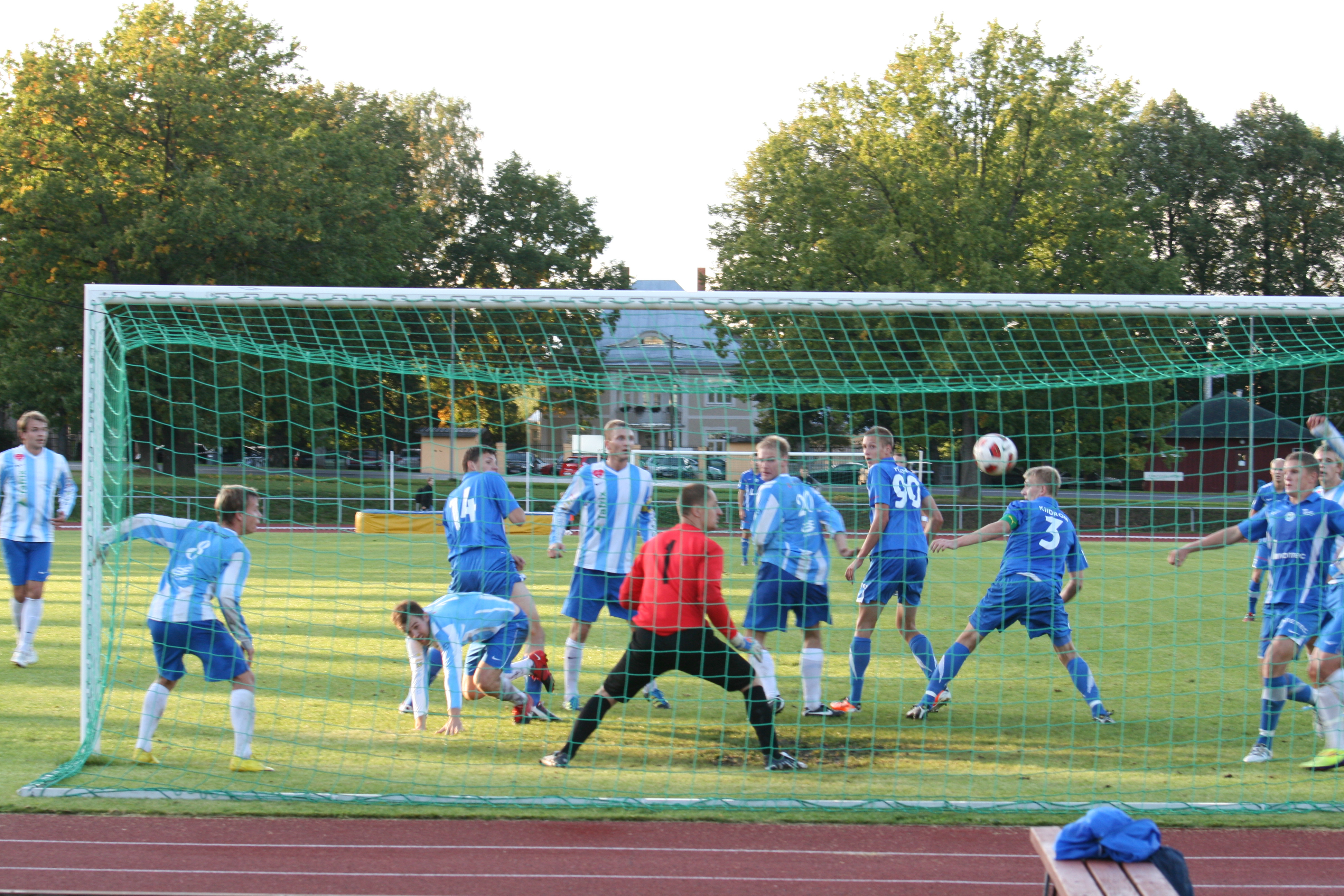 Paide Linnameeskond (kirjus)